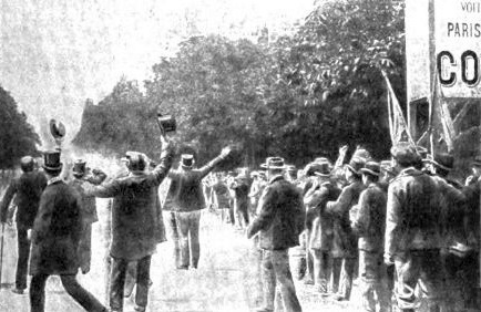 Arrivée d'Émile Levassor Porte Maillot, au Paris-Bordeaux-Parix 1895 (Histoire de l'Automobile, Pierre Souvestre, 1907, p.295)